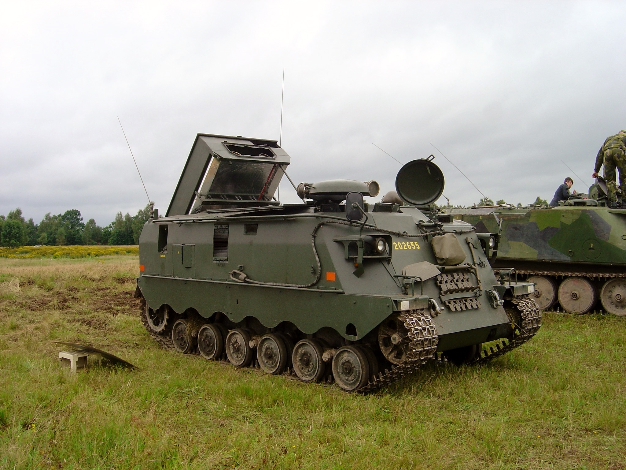 Pansarvärnsrobotbandvagn 551 utställd på Möllerödsdagarna 2007